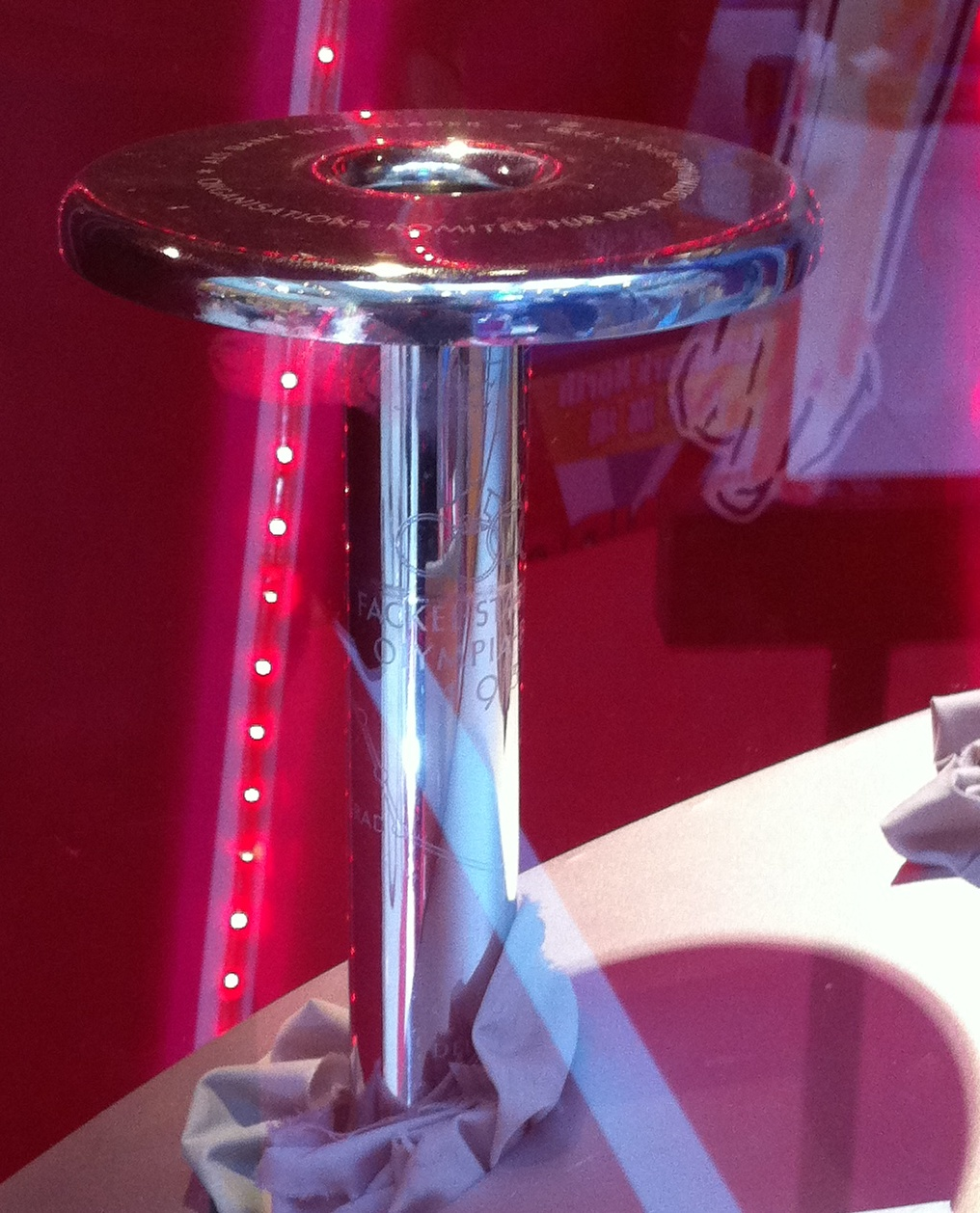 1936年夏季奧運火炬